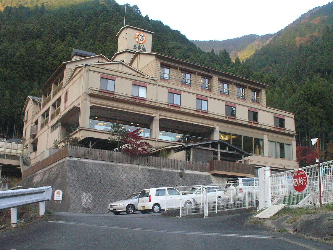 入之波温泉五色湯